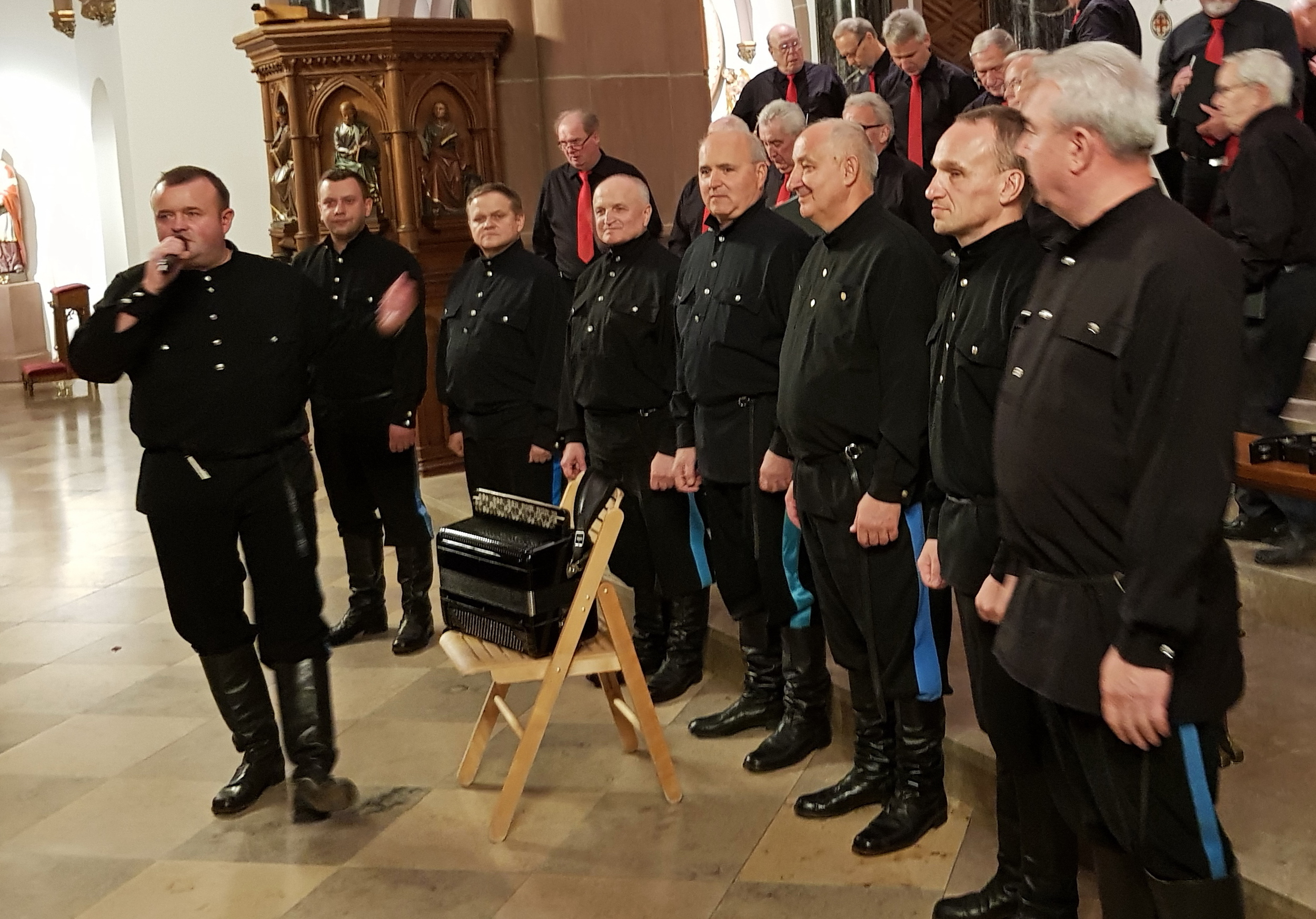 Ural Kosaken Chor bei einem Konzert in der Kirche St. Kilian in Iserlohn-Letmathe.